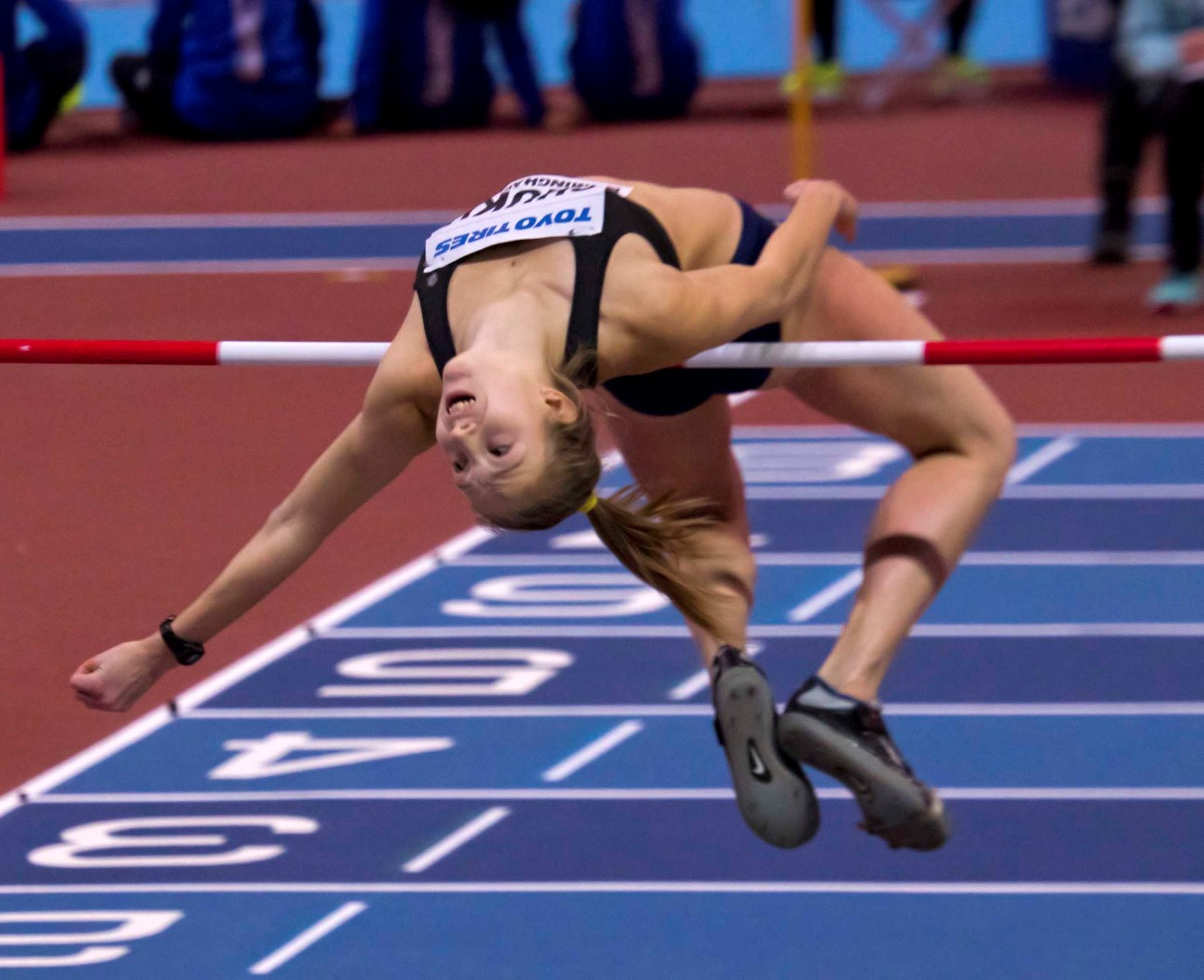 WK020120 shukh hoog